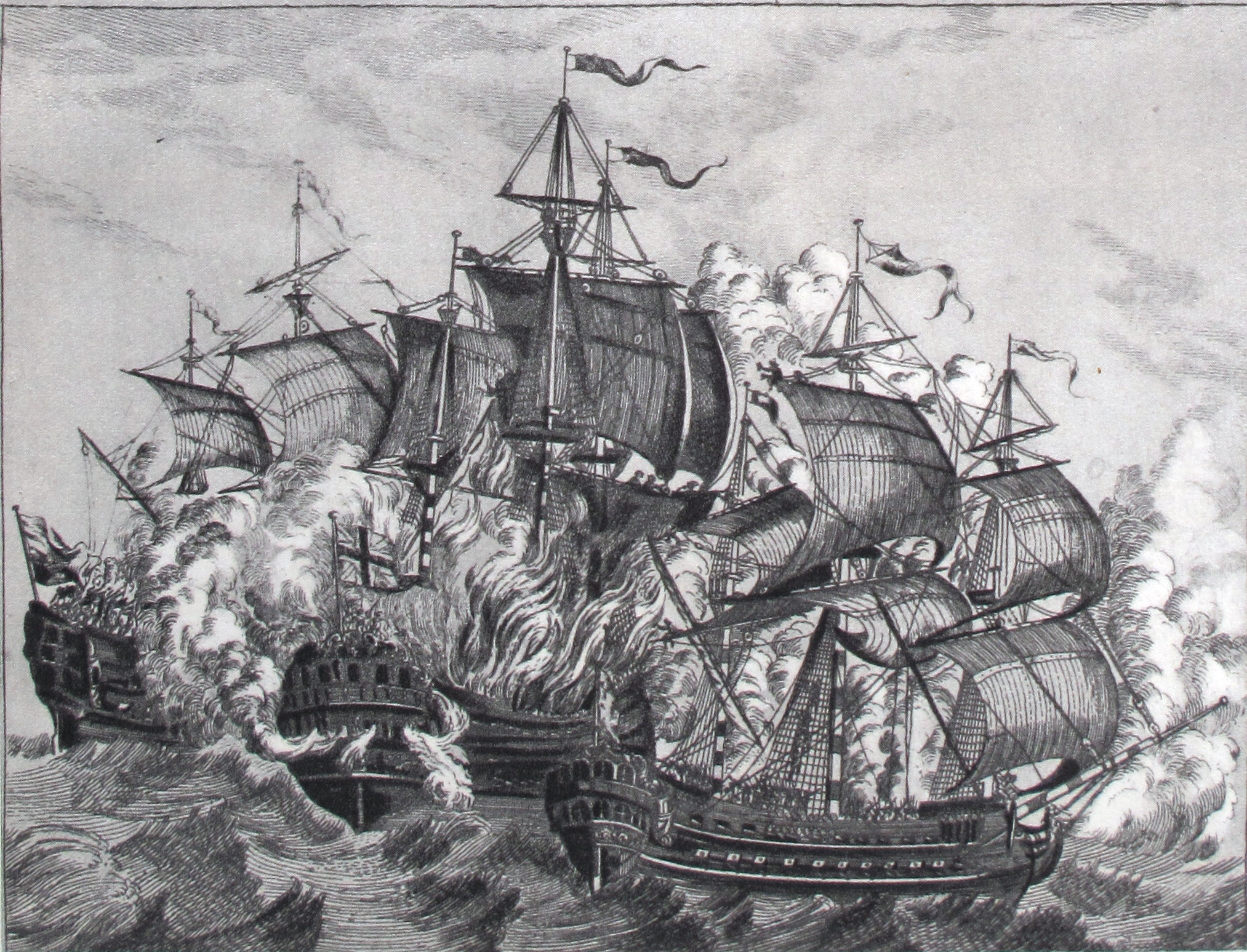 HMS Devonshire